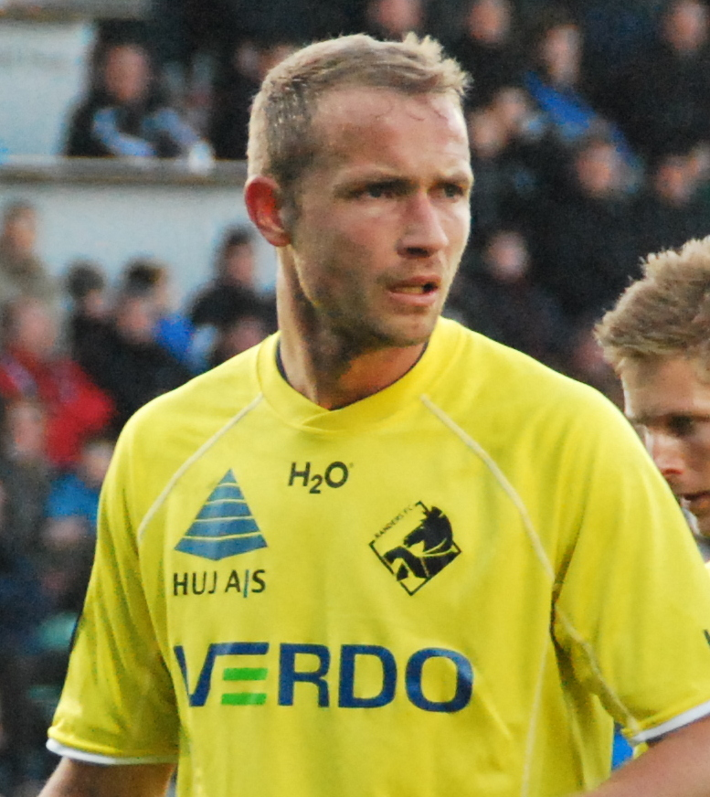 Fodboldspilleren Frank Kristensen fra Randers FC. Her under en 1. divisionskamp mod Viborg FF på Viborg Stadion.